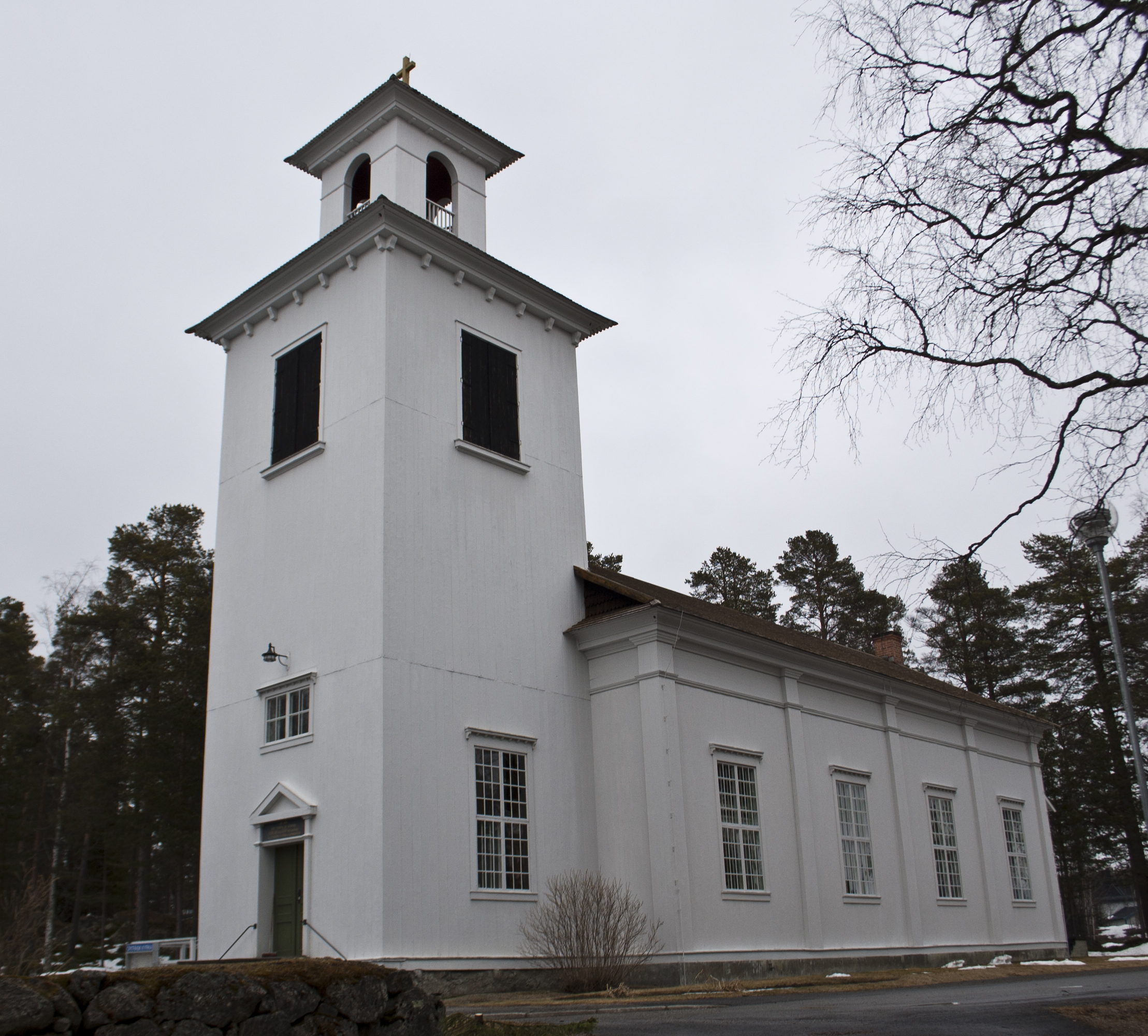 Örträsk kyrka